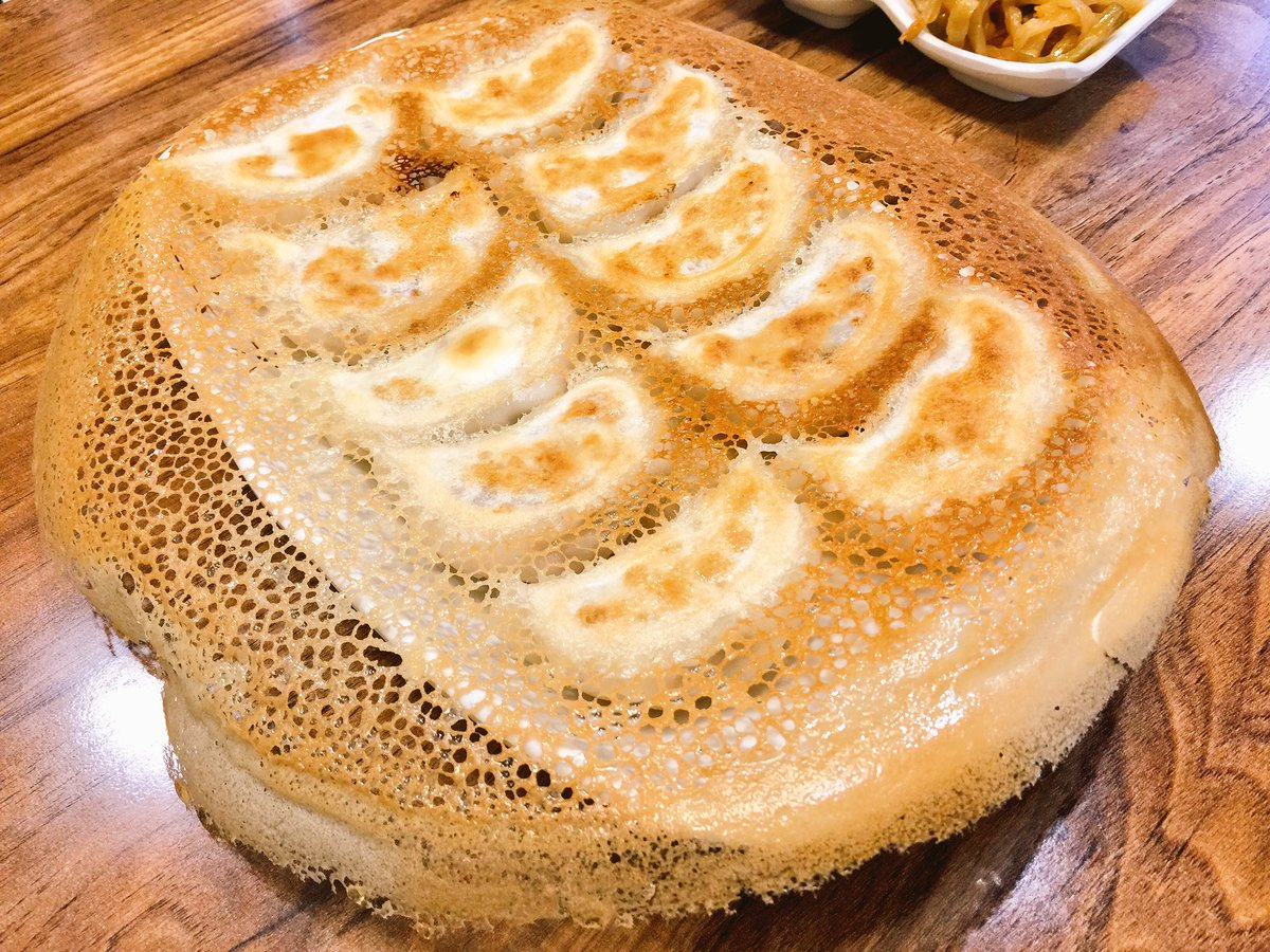 교자입니다